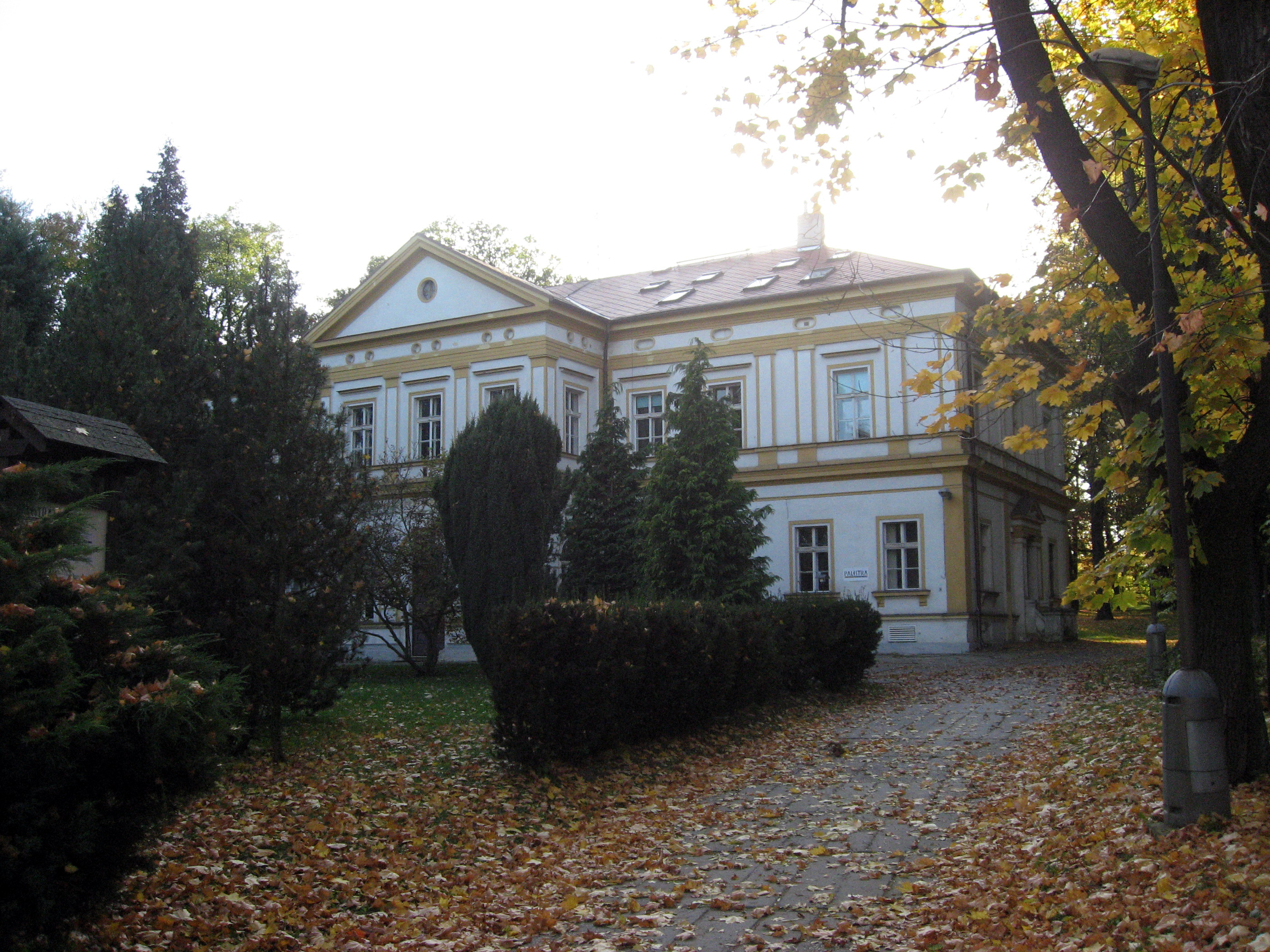 Hostavice, zámeček